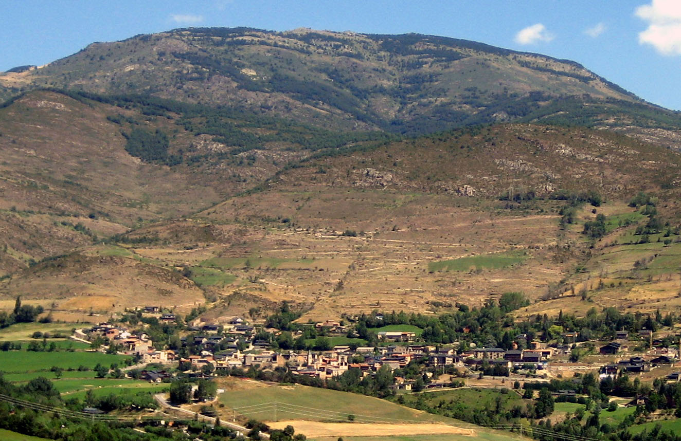 Població de Prullans a la Baixa Cerdanya. Catalunya